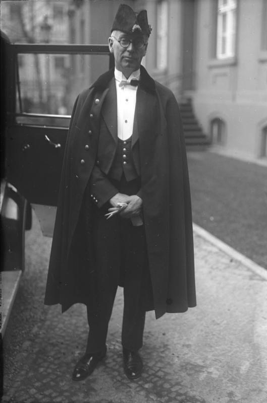 Graf Tattenbach der Chef des Protokolls im Auswärtigen Amt ist zum Gesandten ernannt! Der Chef des Protokolls Graf Franz von Tattenbach im Diplomatenfrack.